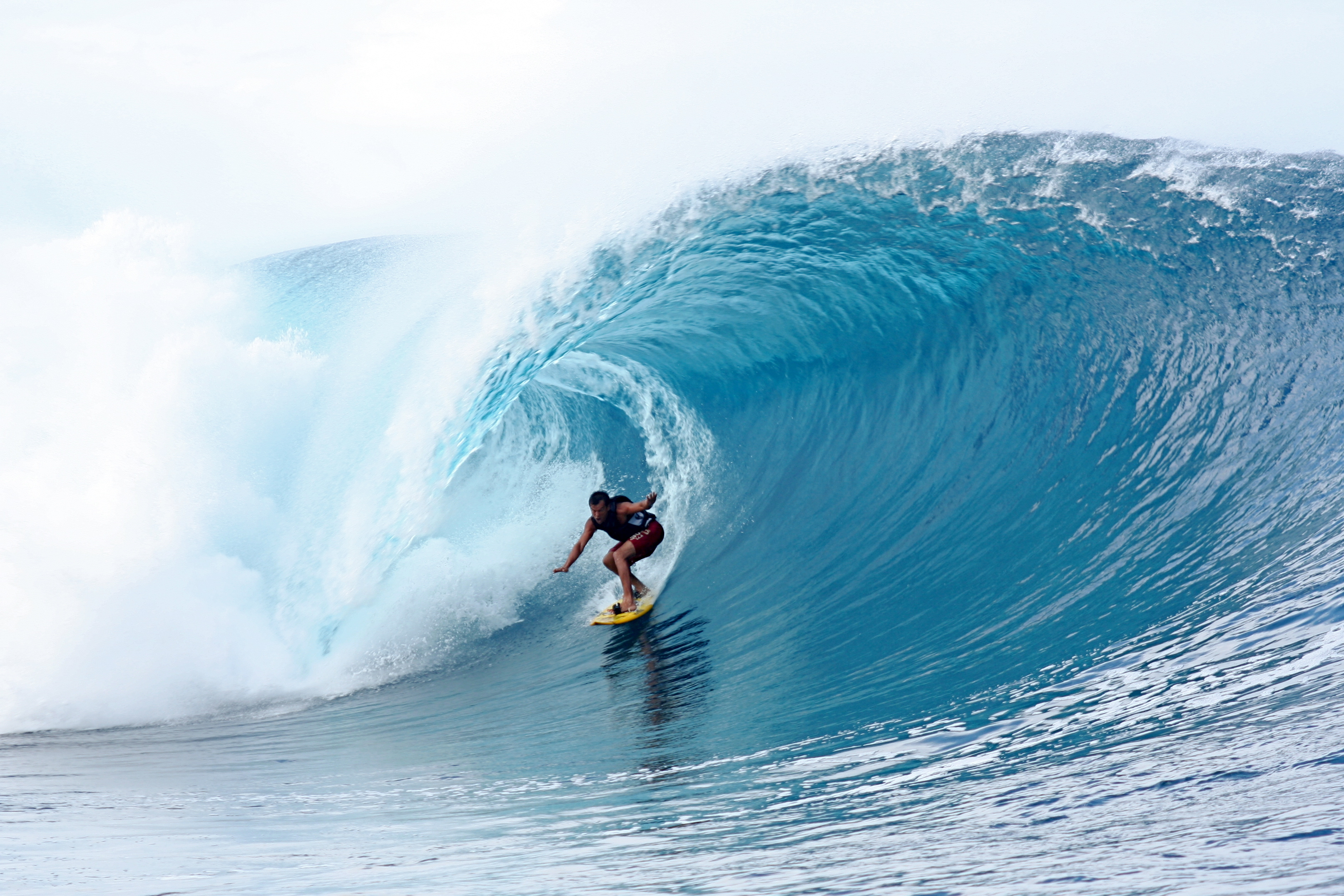 Teahupoo, Papeete, Tahiti